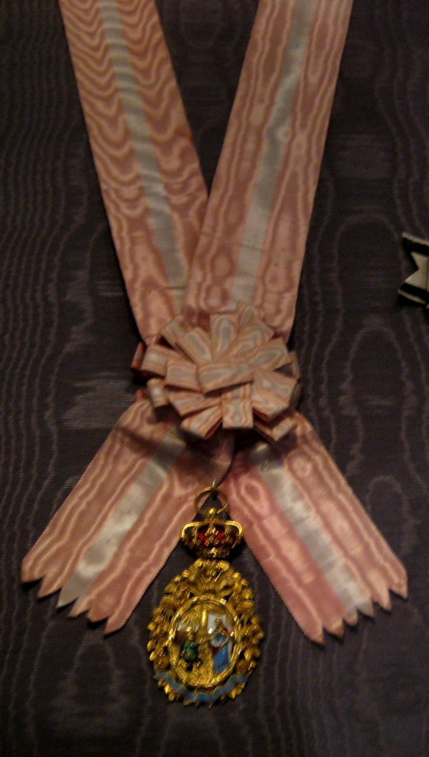 Знак ордена святой Изабеллы на ленте. Принадлежал императрице Марии Александровне. 2-я пол. 19 века.